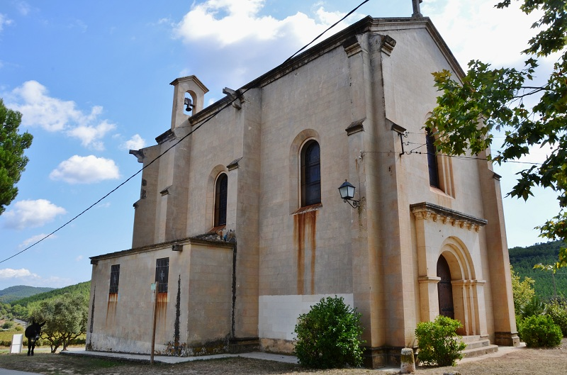 Església de Sant Pere d'Aiguaviva (el Montmell)